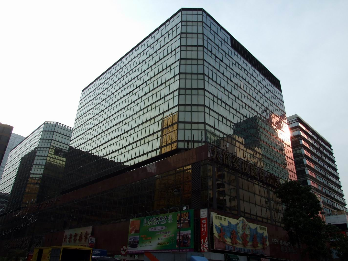 新文華商業中心